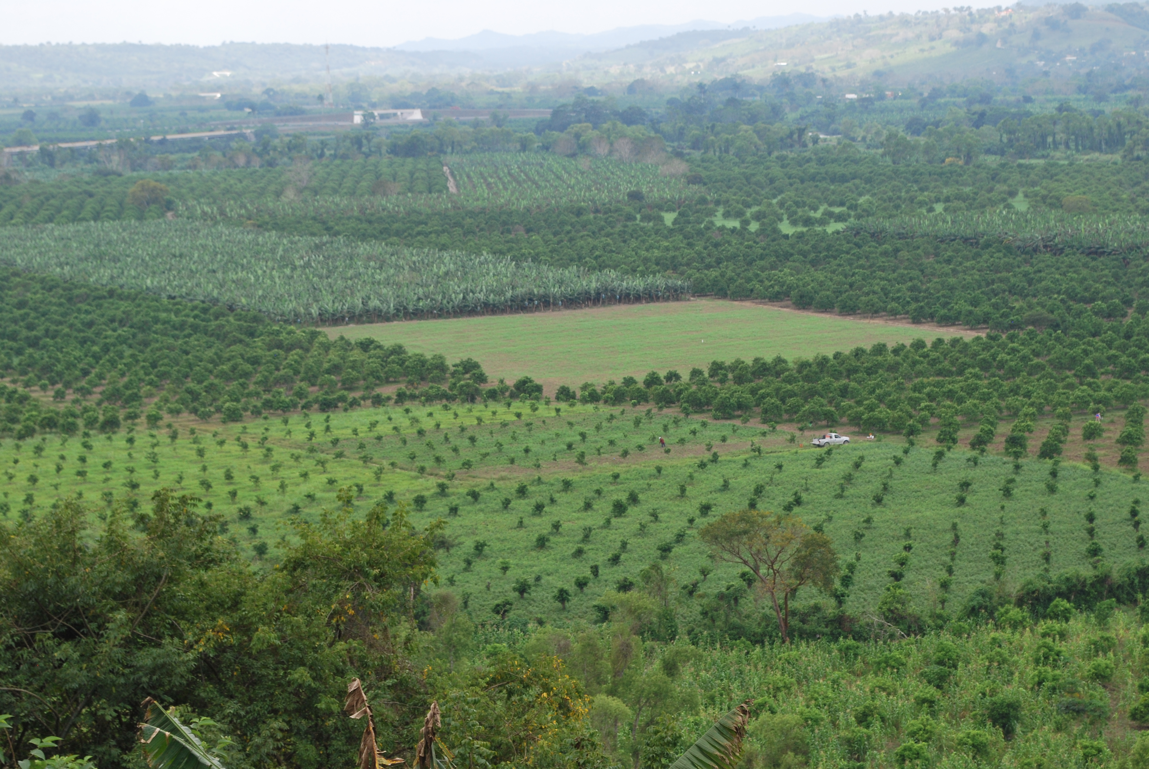 Fields in the municipality of Cazones de Herrera, Veracruz